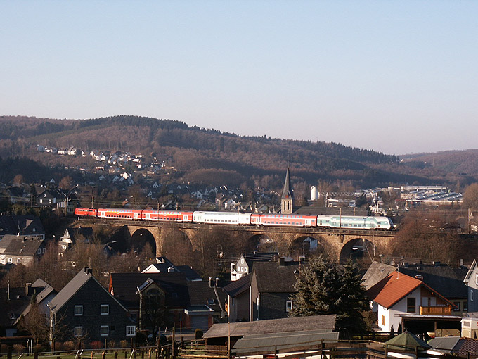 Rhein-Sieg-Express (RE 9) Krefeld–Köln–Siegen–Gießen auf dem Viadukt in Niederdielfen (Dillstrecke)